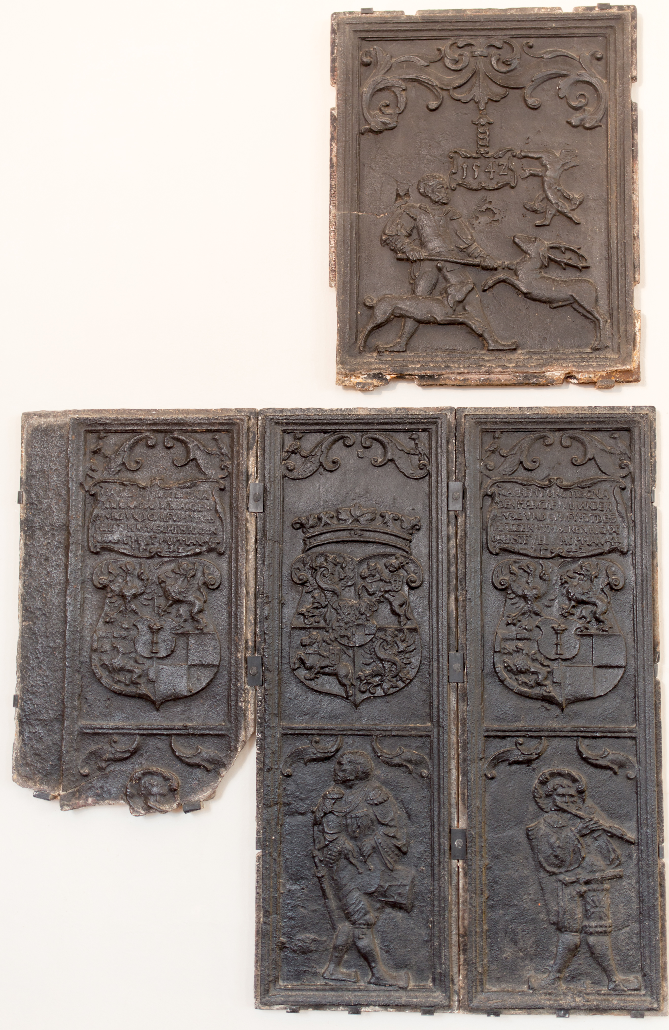 Gusseiserne Ofentafeln